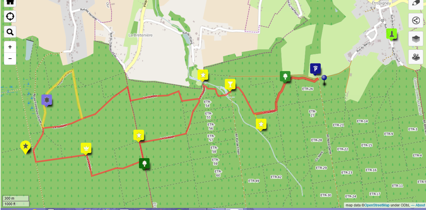 Etrepigney-guepier-carte